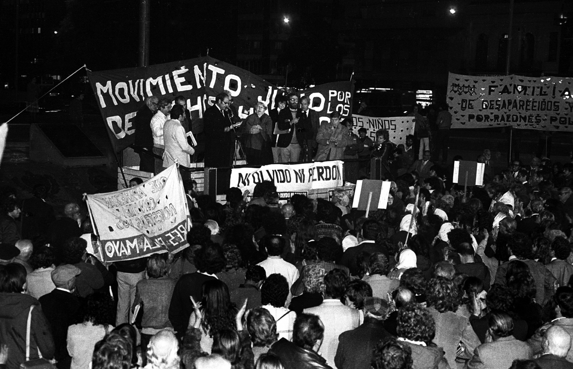 25 de abril de 1984 Acto en el Obelisco por el 41° aniversario del levantamiento de los guetos contra la barbarie nazi, convocado por el Movimiento Judío por los Derechos Humanos